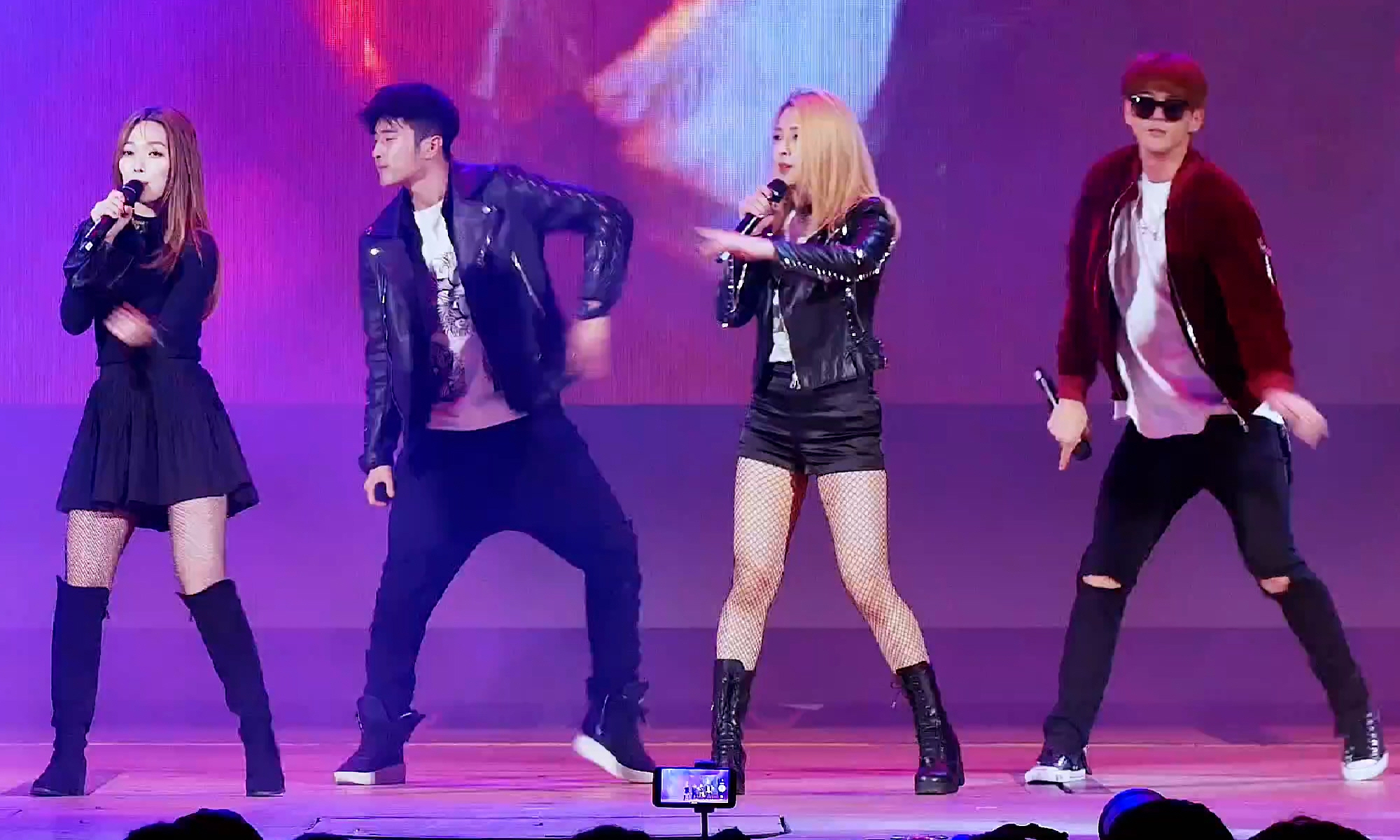 170108 롯데월드 라이징스타 - K.A.R.D Oh NaNa 직캠 by DaftTaengk